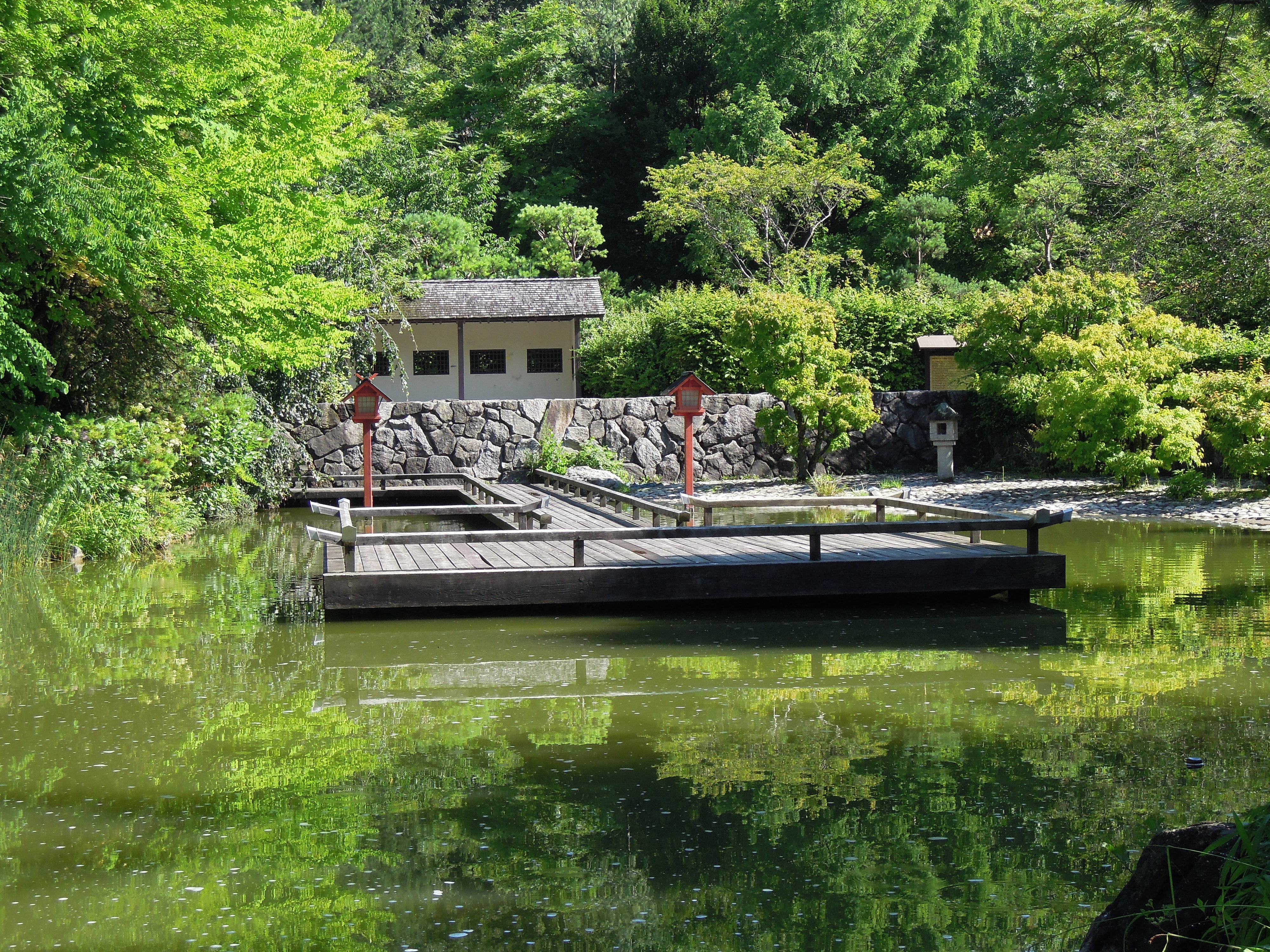 Westpark (München) - Japangarten - Steg mit Wartehalle